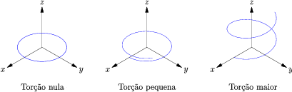 Diferentes medidas de torção nos planos X,Y,Z